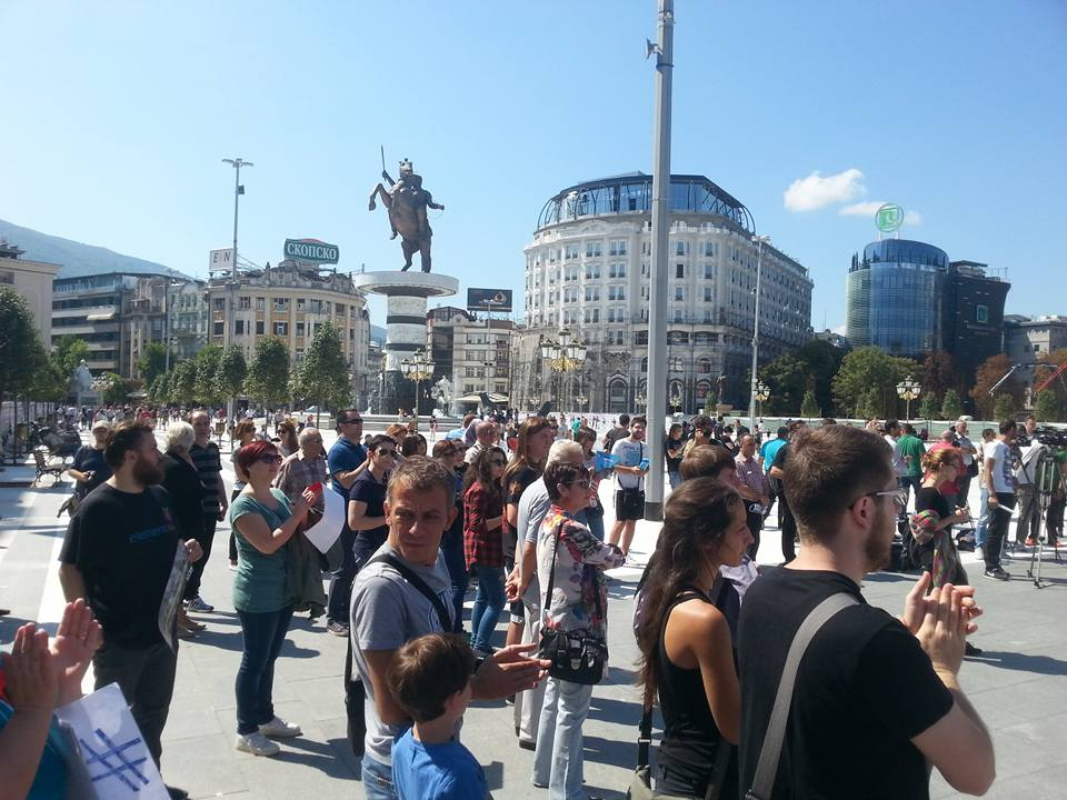 Собир во солидарност со бегалците во Скопје, плоштад Македонија.